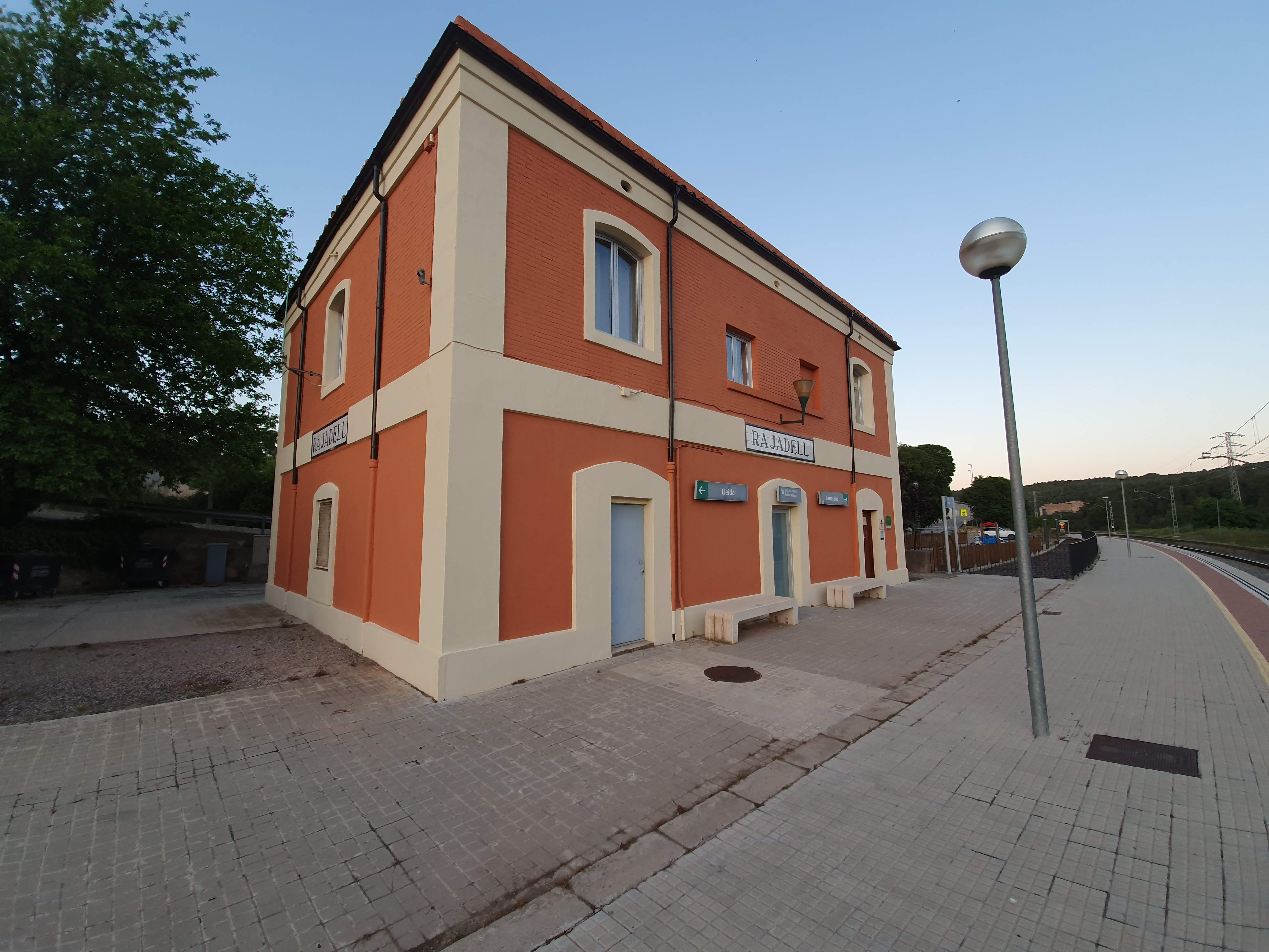 Estació de Rajadell